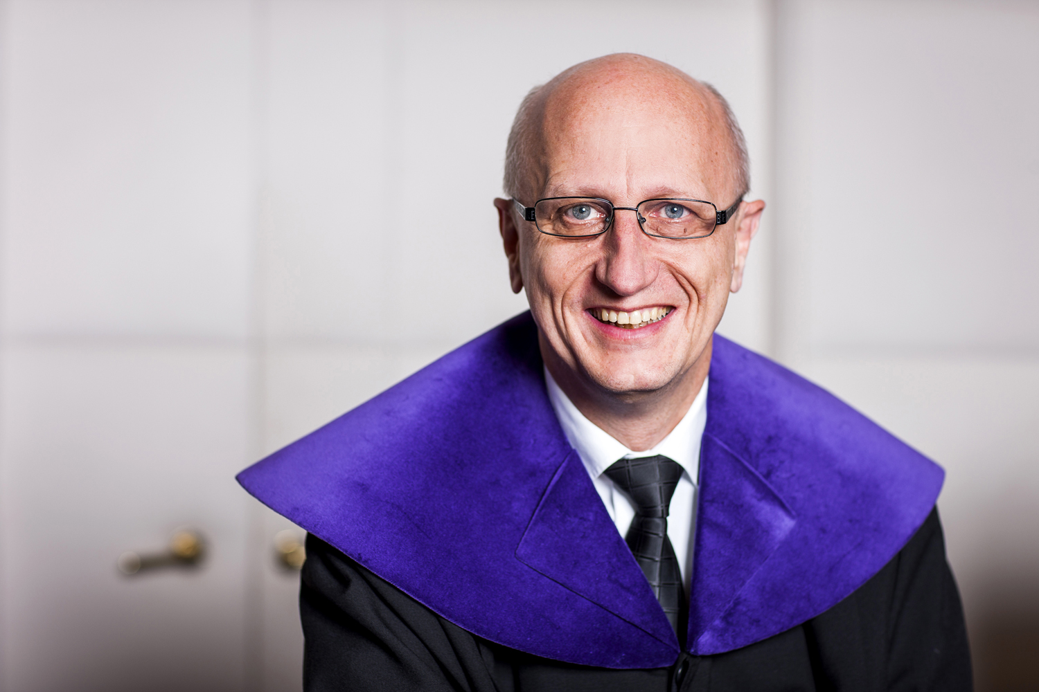 Dr. Georg Lienbacher, Mitglied des österreichischen Verfassungsgerichtshofs seit 2011.